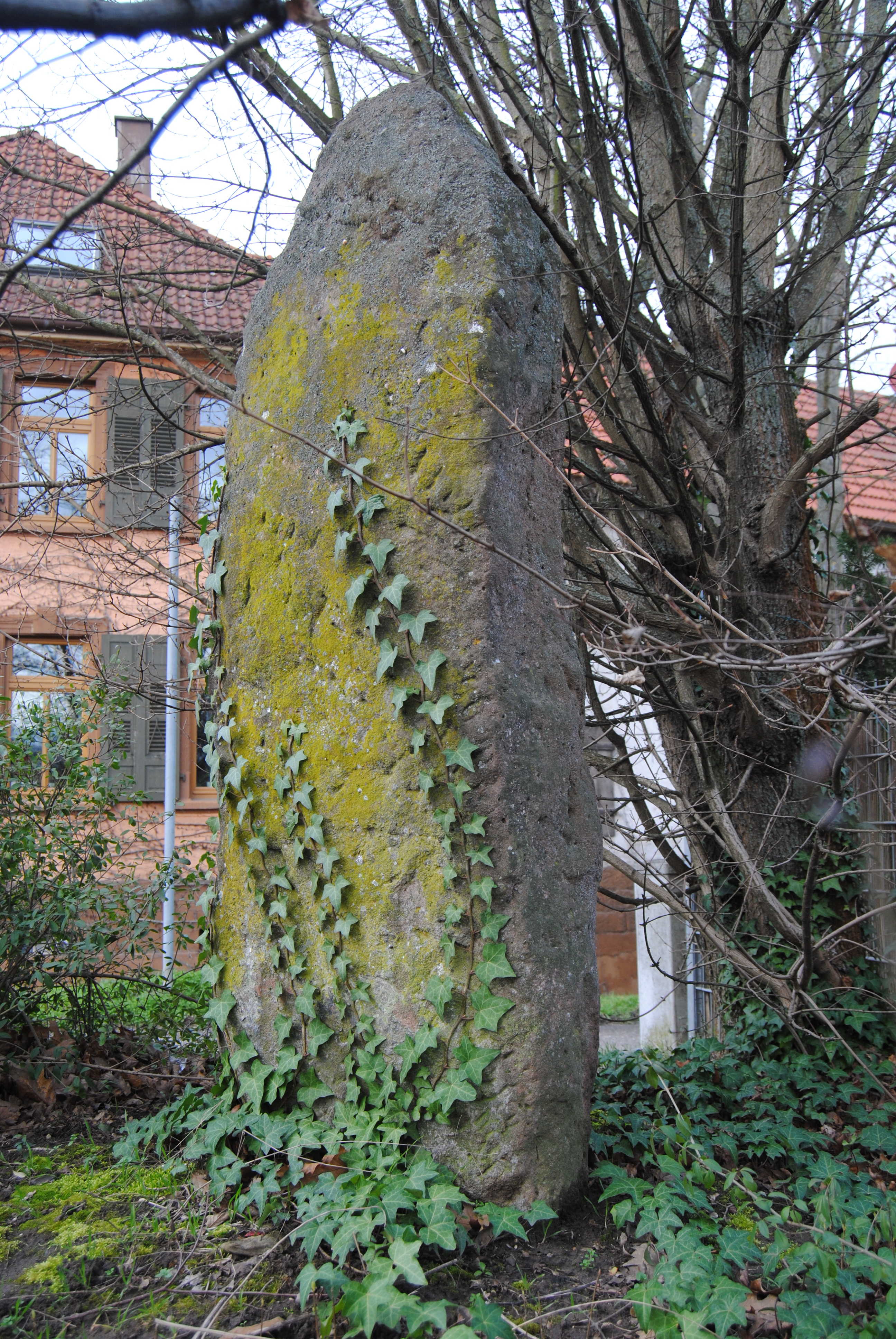 Langer Stein (Menhir), 1.-2. Jh. v. Chr., aufgestellt im OT Schauernheim der Gemeinde Dannstadt-Schauernheim in Rheinland-Pfalz